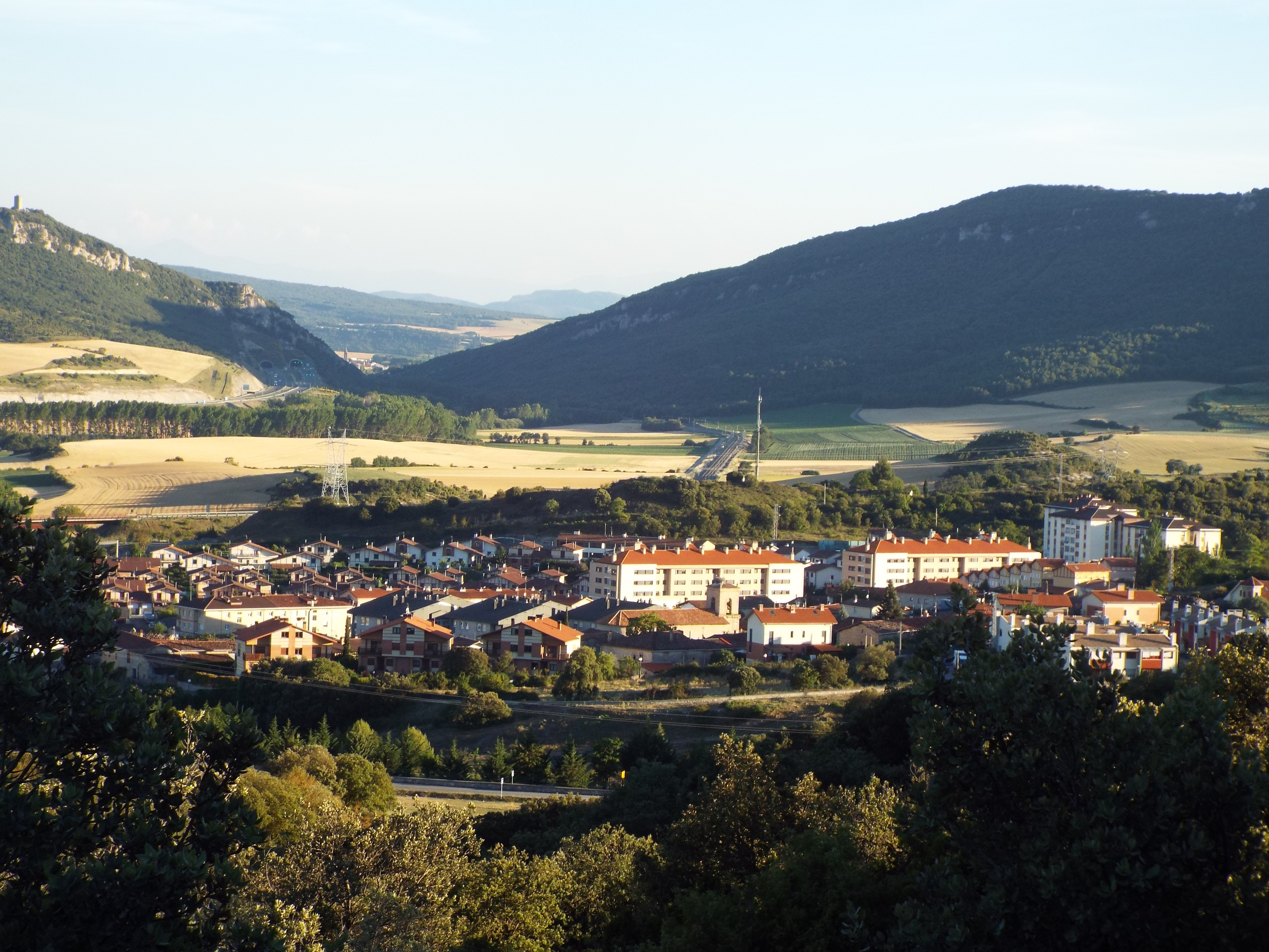 Vista de Nanclares de la Oca (Álava) desde la Sierra de Badaia